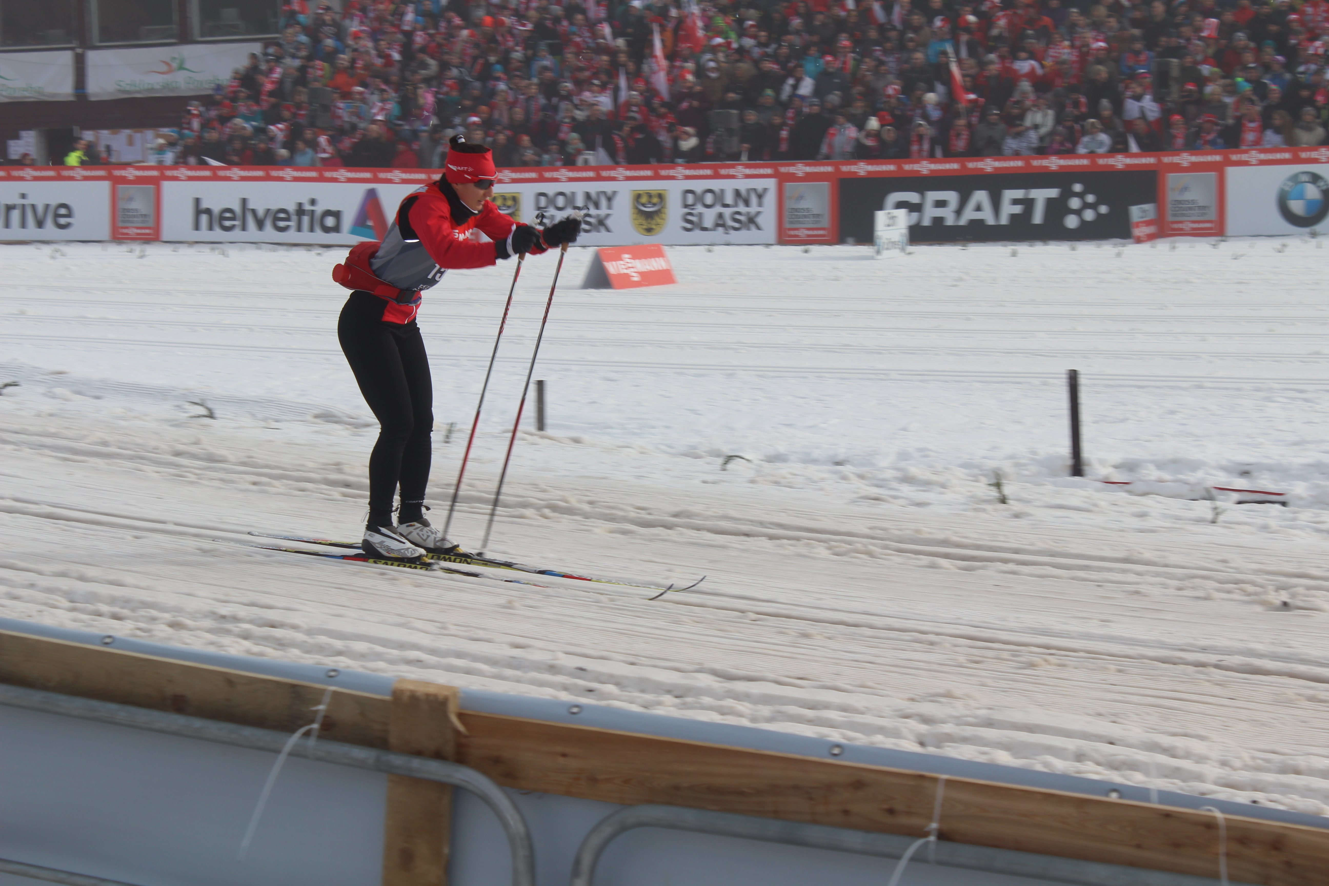 Sylwia Jaśkowiec Szklarska Poręba